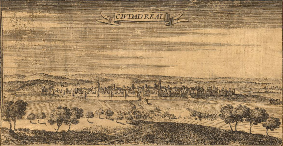 Vista panorámica de la localidad de Ciudad Real (Castilla-La Mancha - España) en 1687, según dibujo de Juan Francisco Leonardo. Corresponde a un detalle del Mapa del Arzobispado de Toledo, impreso por iniciativa del arzobispo Luis Manuel Fernández de Portocarrero.